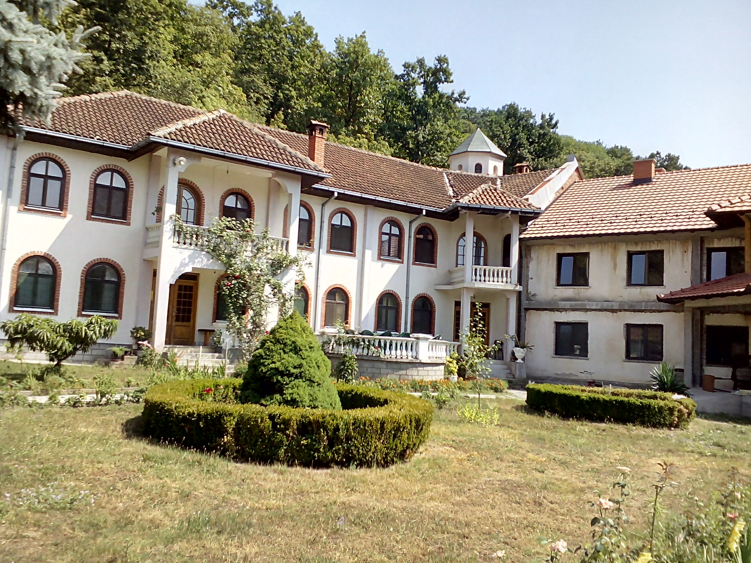 Миљков манастир (раније манастир Буковица) недалеко од села Гложане код Свилајнца